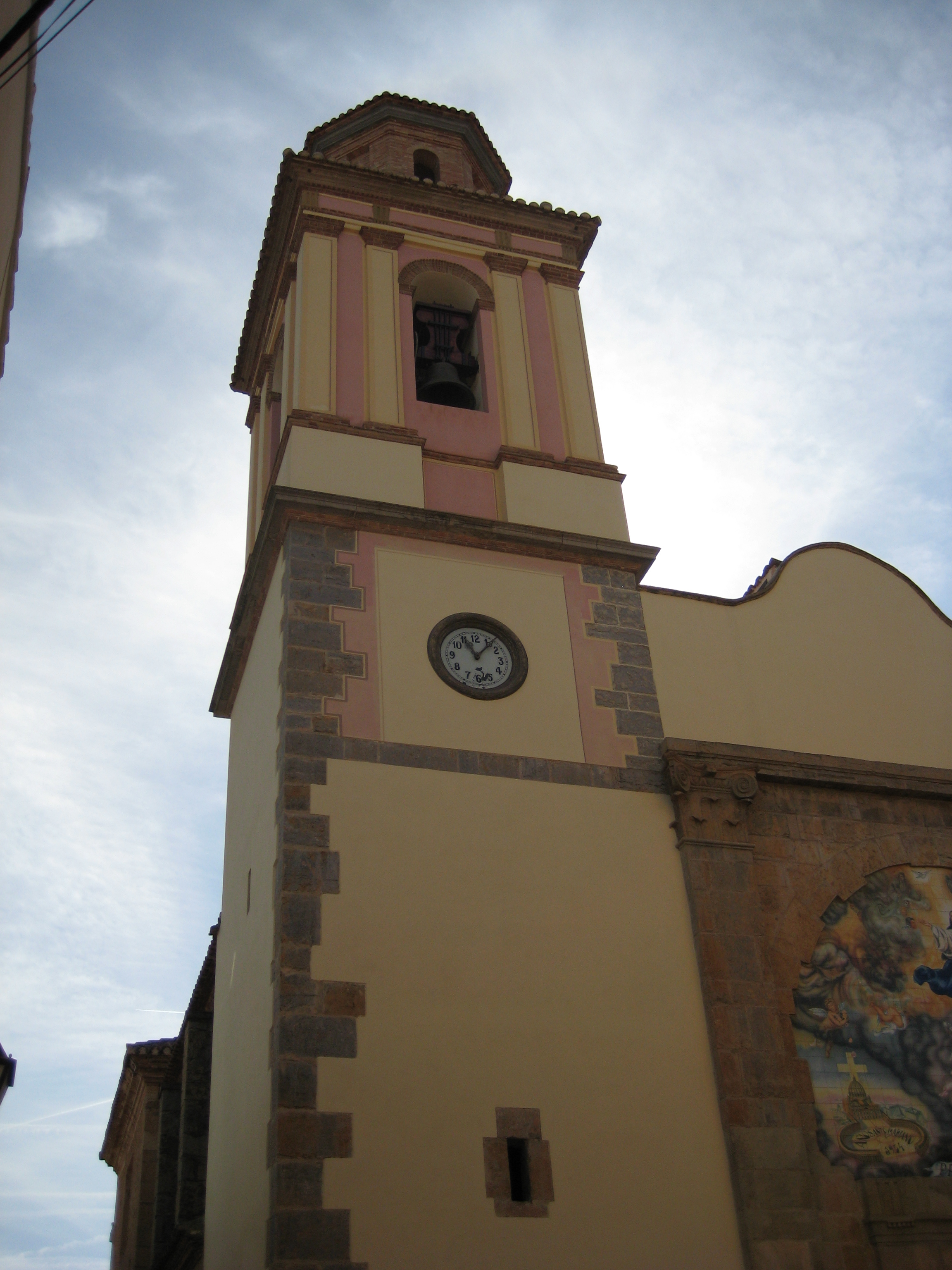 Torre campanar de l'església de l'Assumpció de Suera (Plana Baixa)